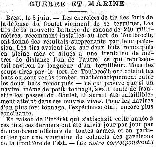 Article publié dans "Le journal des débats politiques et littéraires" du 4 juin 1912 concernant la nouvelle batterie de canons de 240 mm installée au fort de Toulbroc'h.